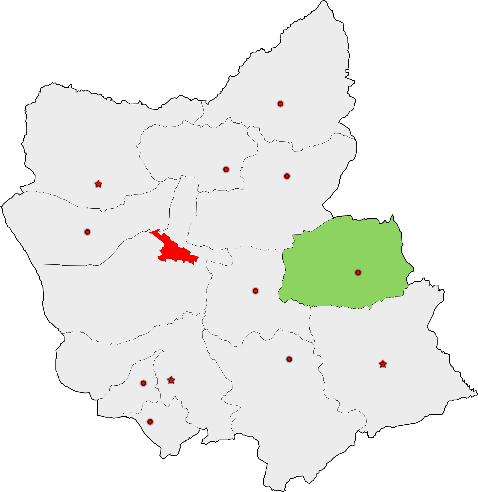 حوزهٔ انتخاباتی سراب برای انتخابات مجلس شورای اسلامی